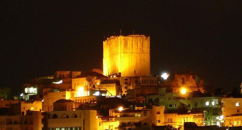 صورة لبرج صافيتا والذي هو جزء من قلعة صافيتا